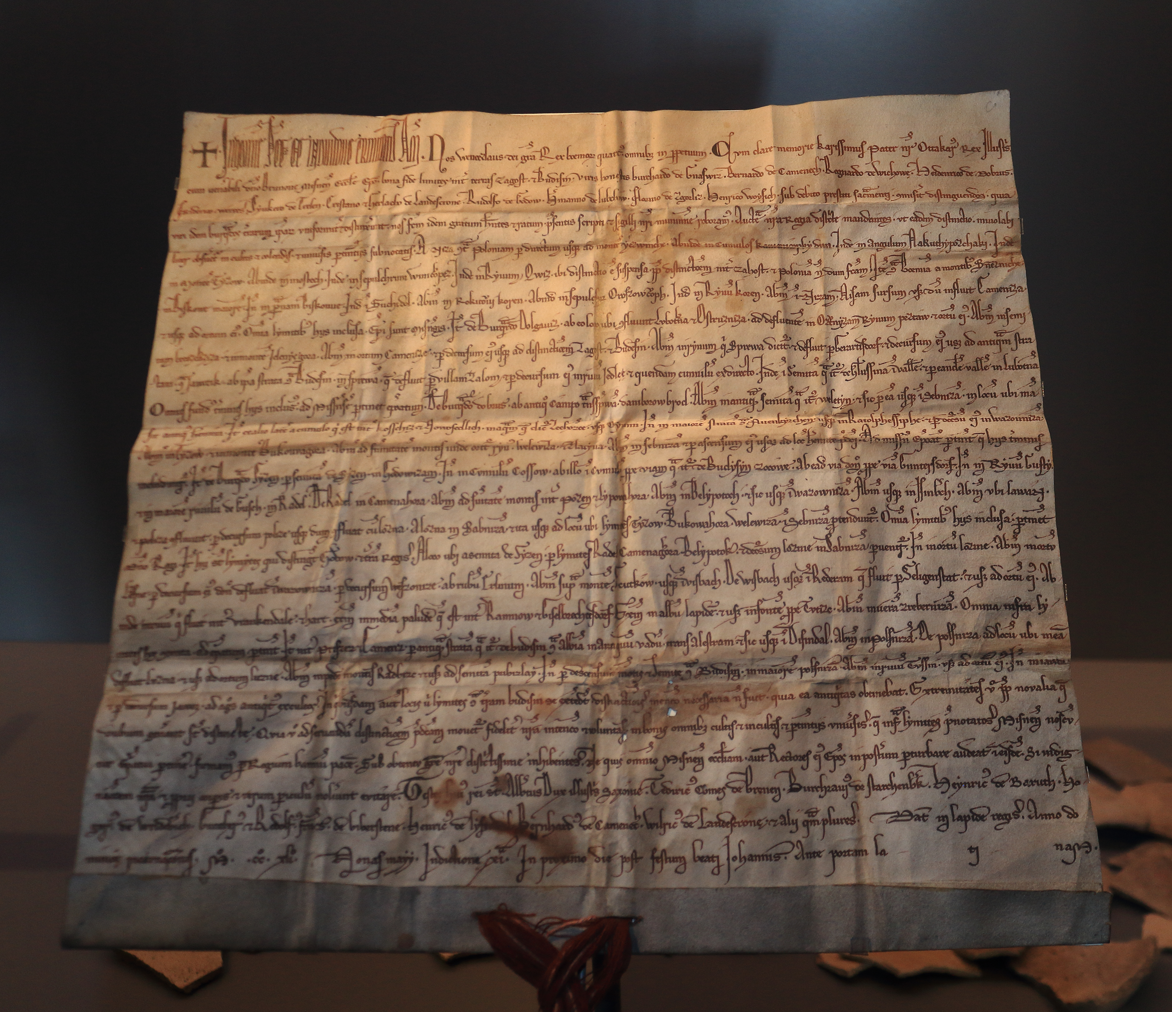 Von Wenzel I. gesiegelte Oberlausitzer Grenzurkunde von 1241. Hier wurde die Grenzziehung zwischen Sachen und Böhmen festgelegt, welche über Jahrhunderte standhielt. Im Museum auf der Festung Königstein (s.a. Oberlausitzer Grenzurkunde)